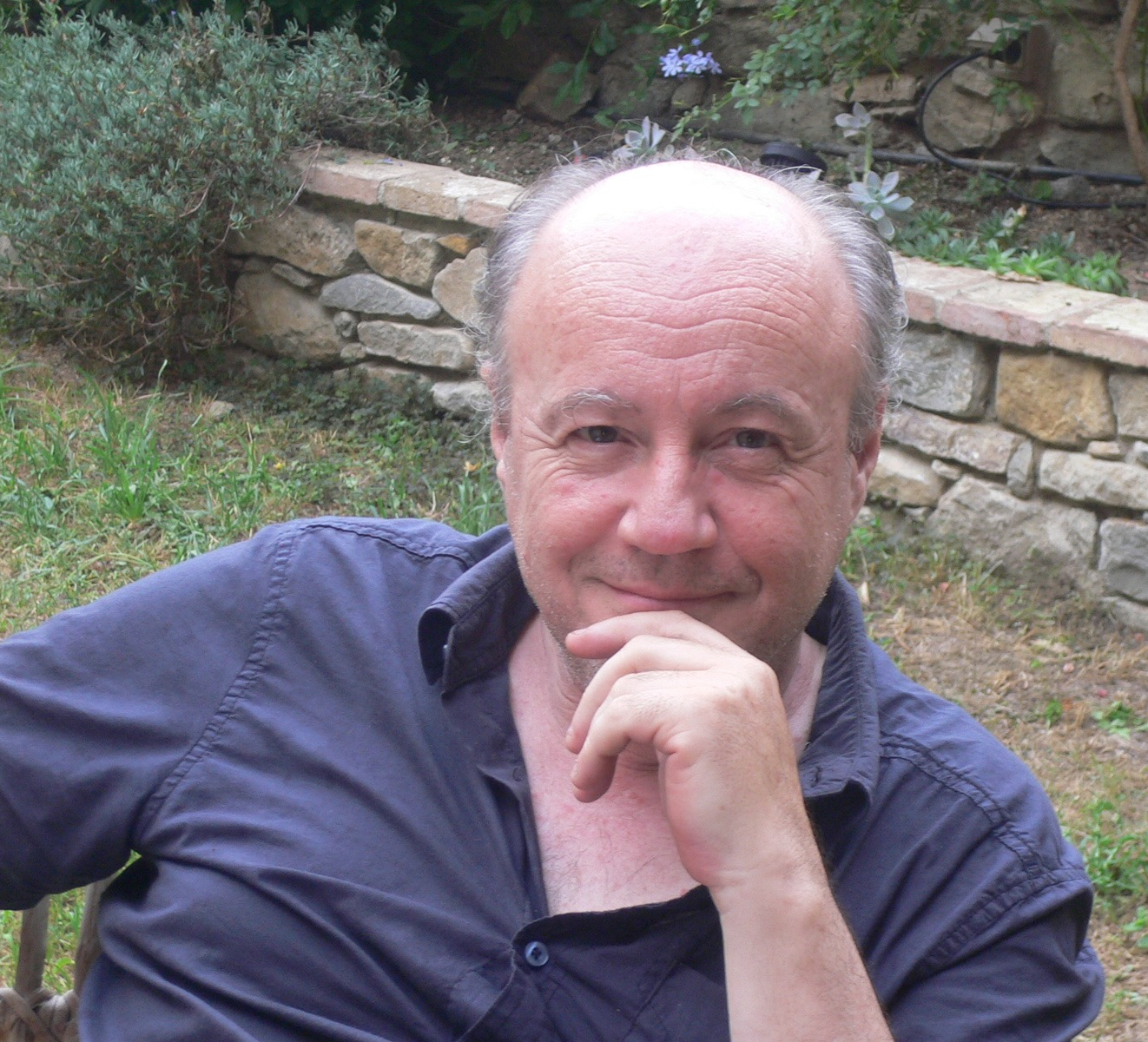 Miquel Roger Casamada